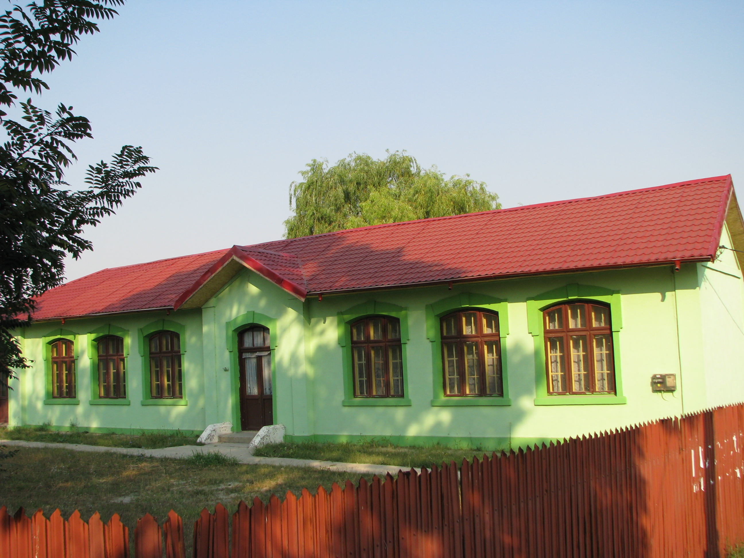 Școala veche din Bucșani, Giurgiu